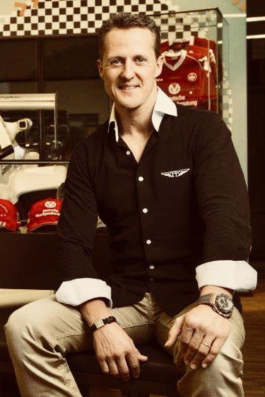 Michael Schumacher